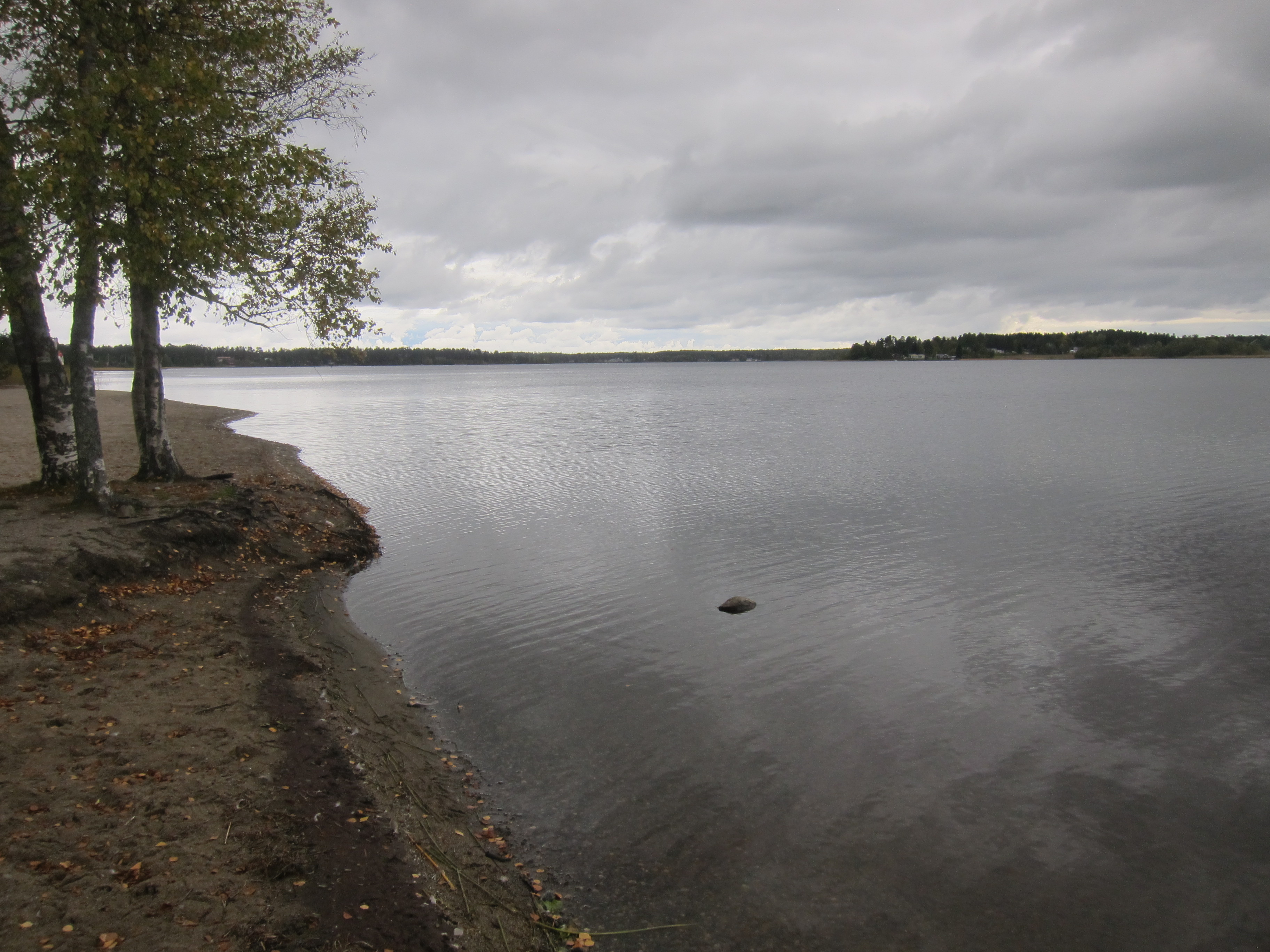 Stöcksjöns badplats.